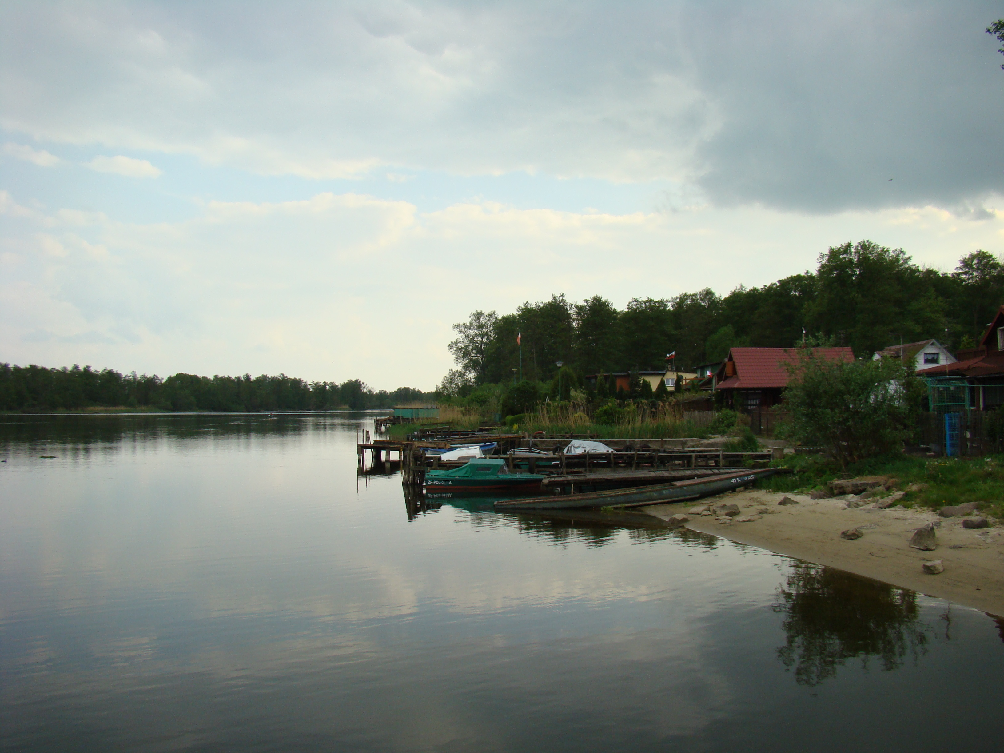 Odra Zachodnia na wysokości Moczył, (Gmina Kołbaskowo, Powiat policki, Województwo zachodniopomorskie), Polska